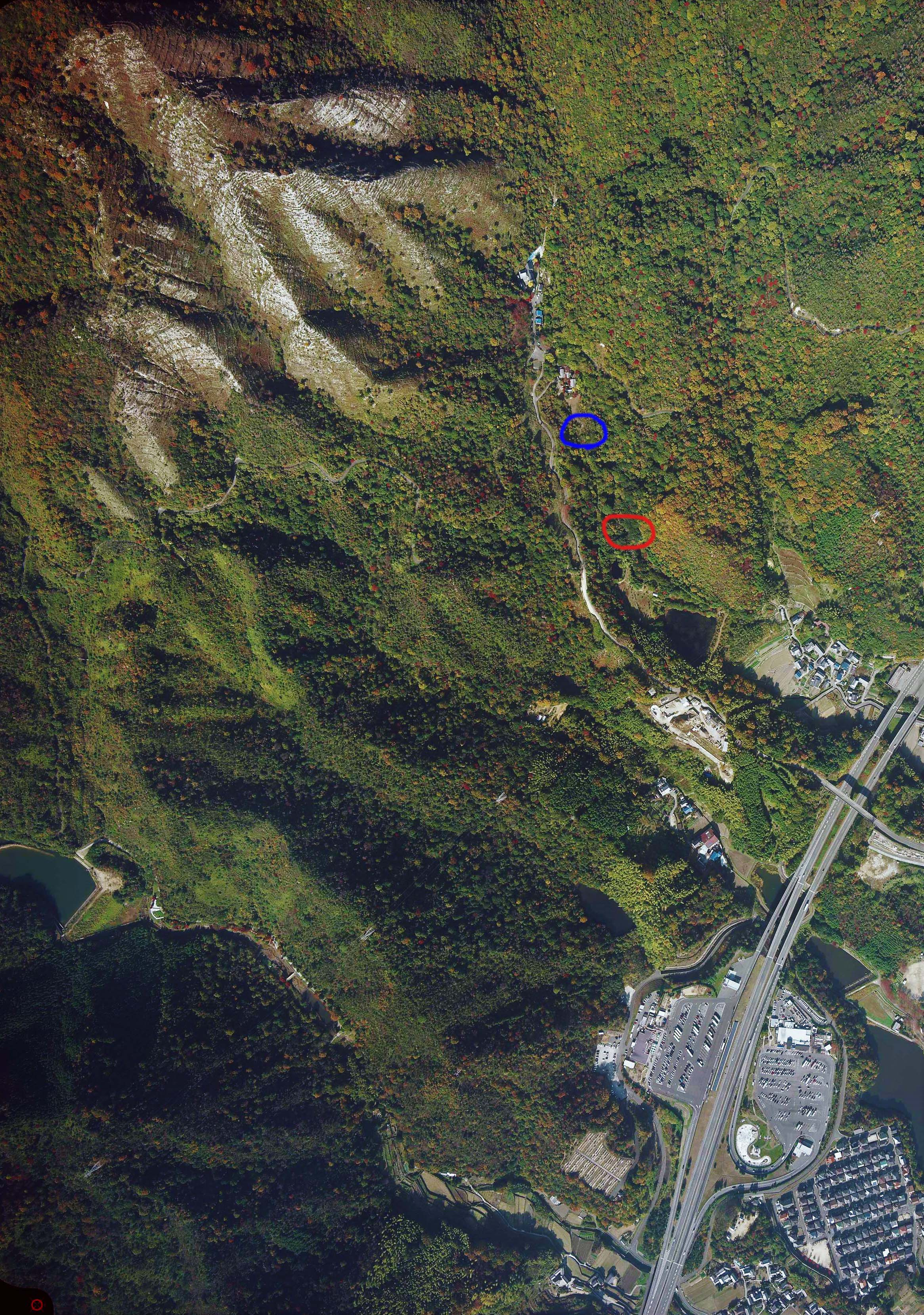 広島県福山市山手町の俄谷砂留群。赤丸が第一砂留、青丸が第二砂留。全部で14基の砂留が存在する。